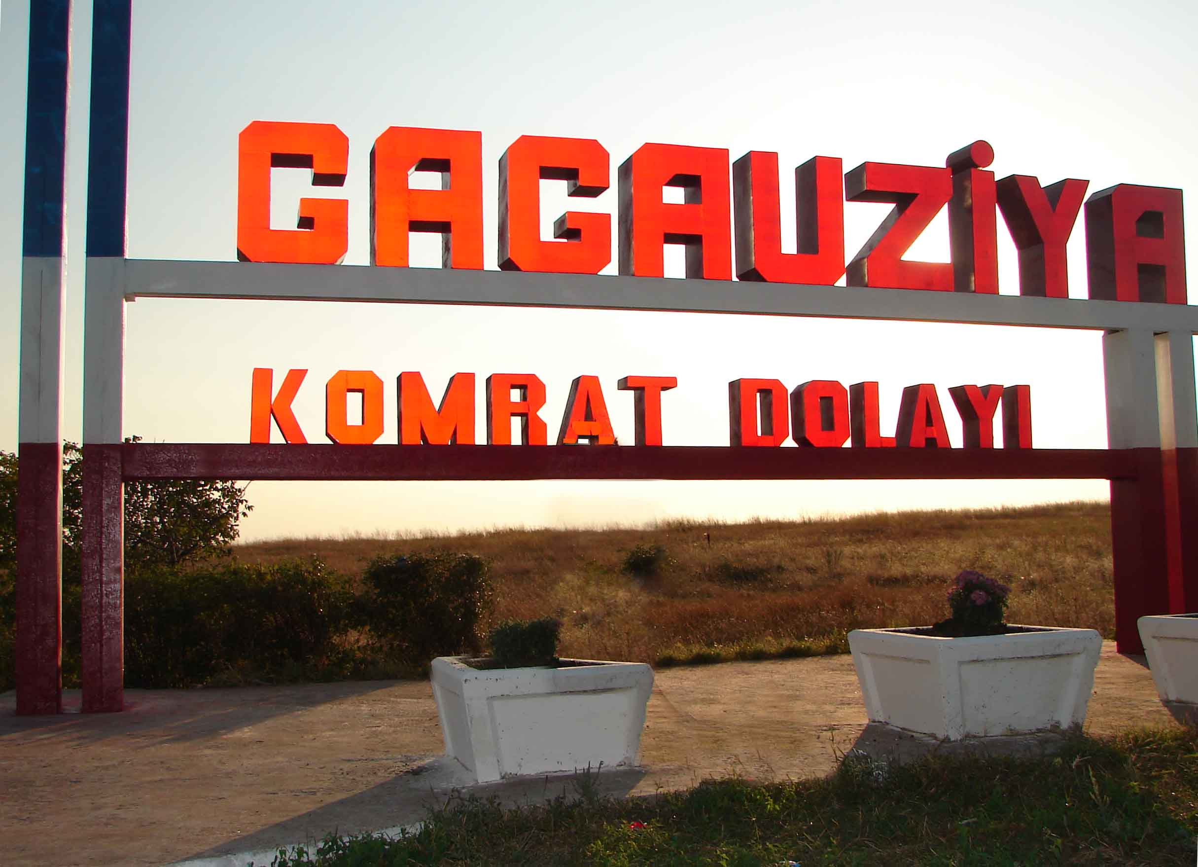 Panou la intrarea în U.T.A.G., rep. Moldova